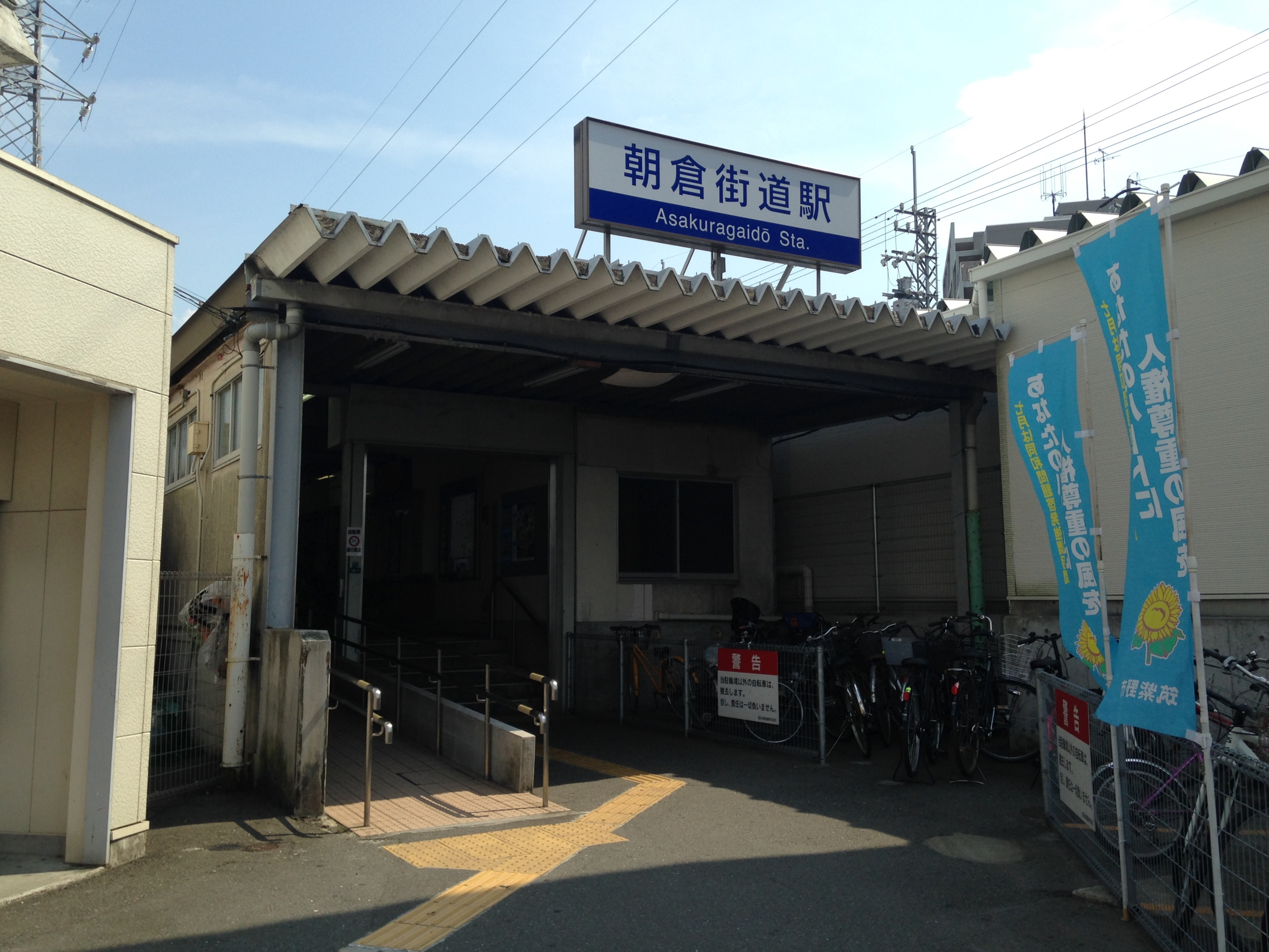 朝倉街道駅駅舎